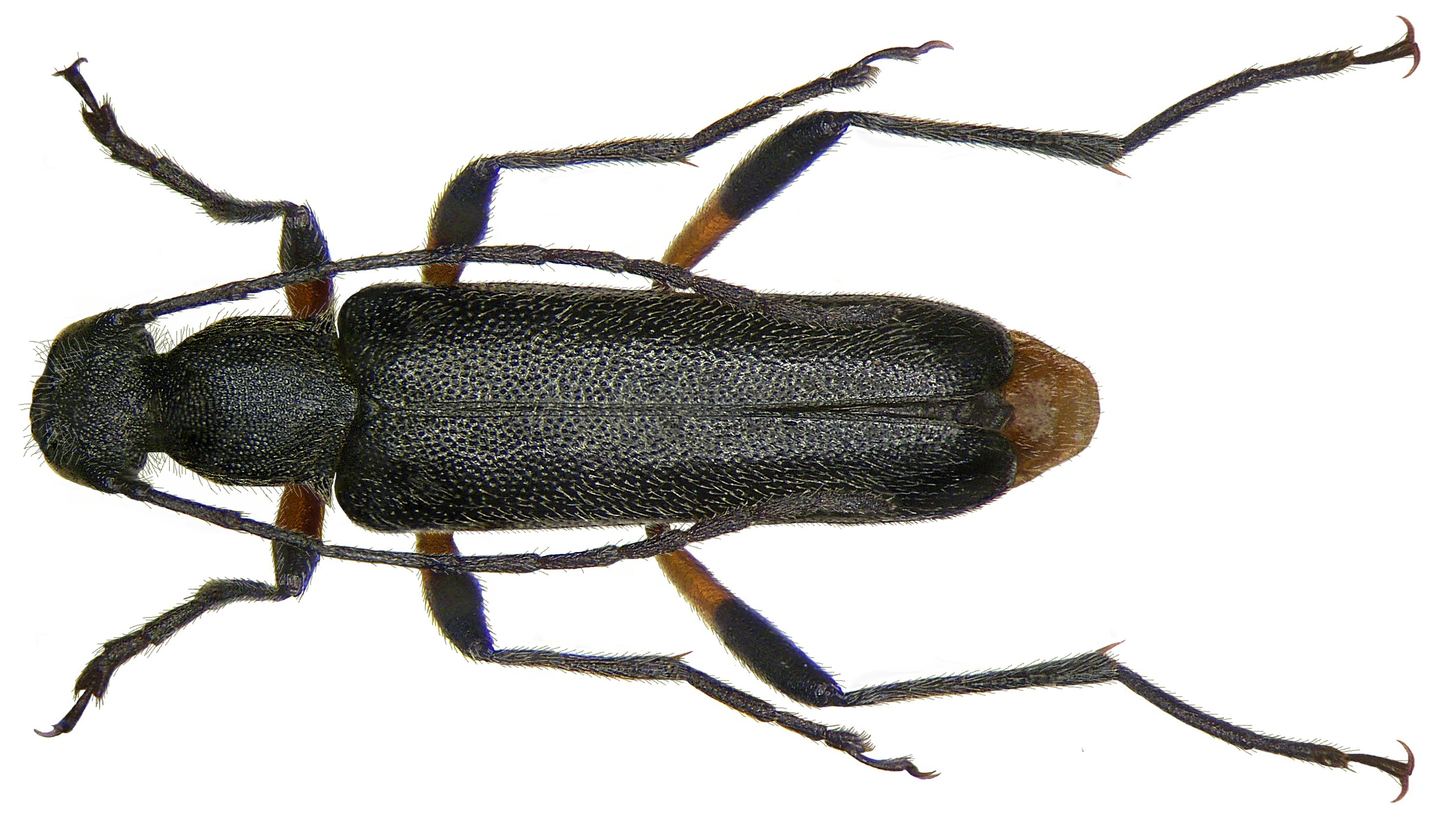 Familie: Cerambycidae Größe: 6-9 mm Verbreitung: Europa Ökologie: Entwicklung in Eiche und Linde Fundort: Germania, Oberfranken, Kulmbach leg.det. U.Schmidt, 1996 Foto: U.Schmidt, 2008